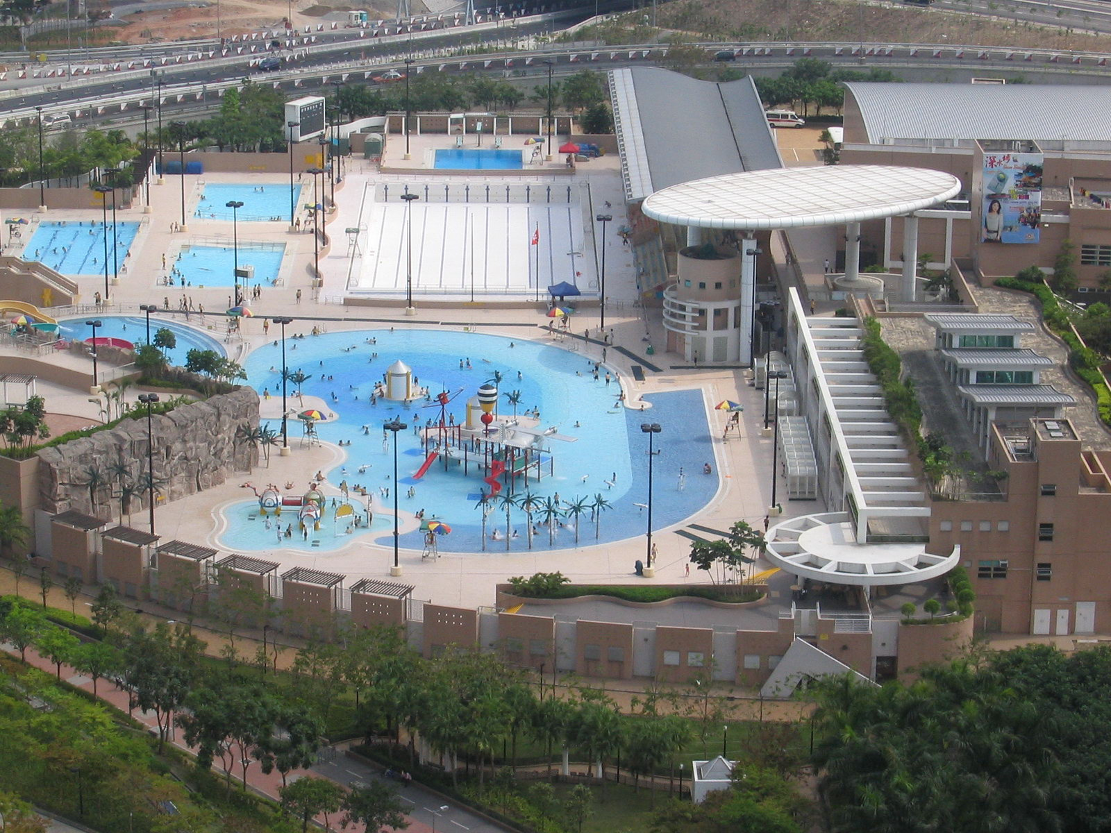 將軍澳游泳池 Tseung Kwan O Swimming Pool